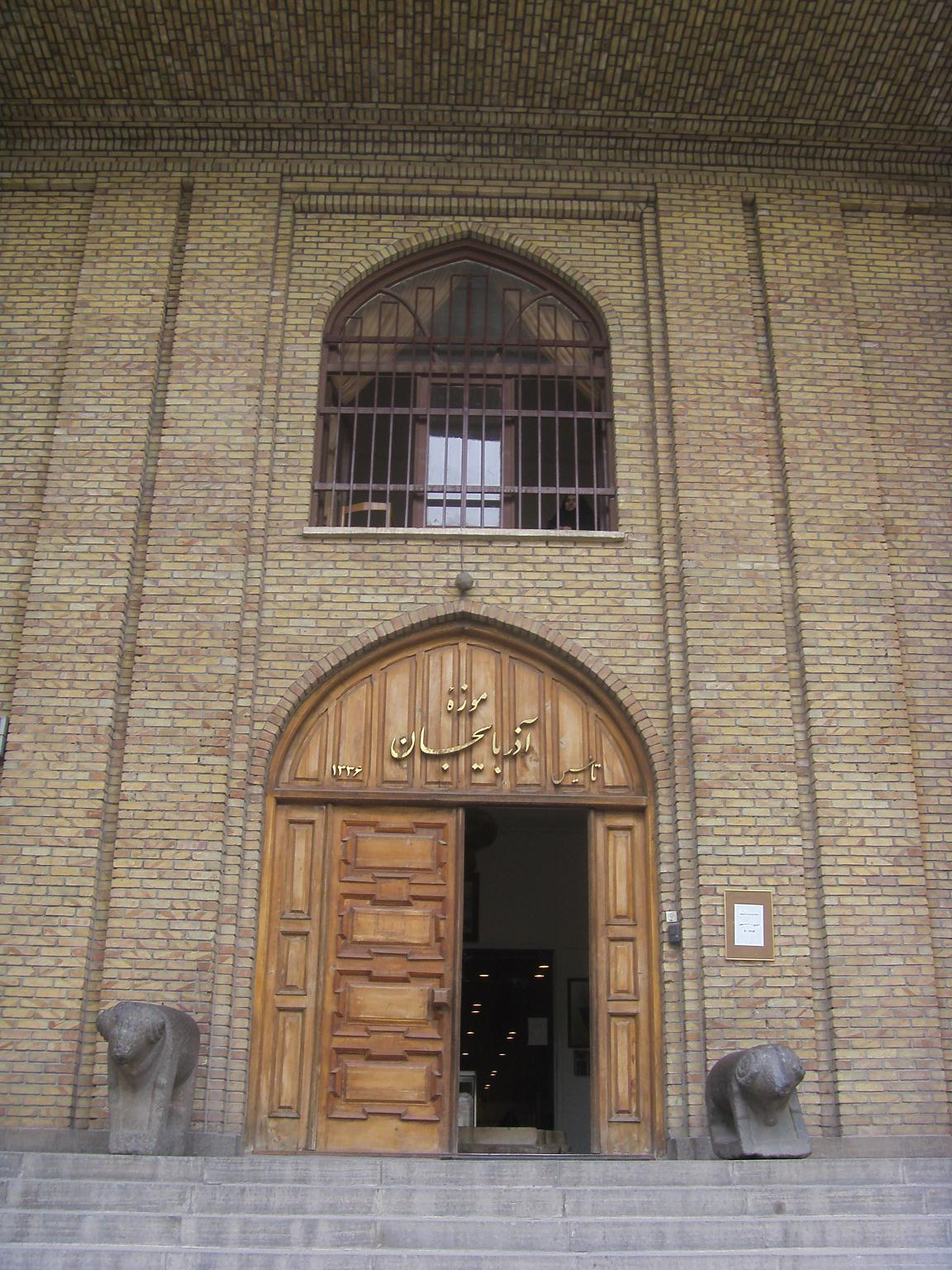 Azerbaijan Museum, Tabriz, Iran